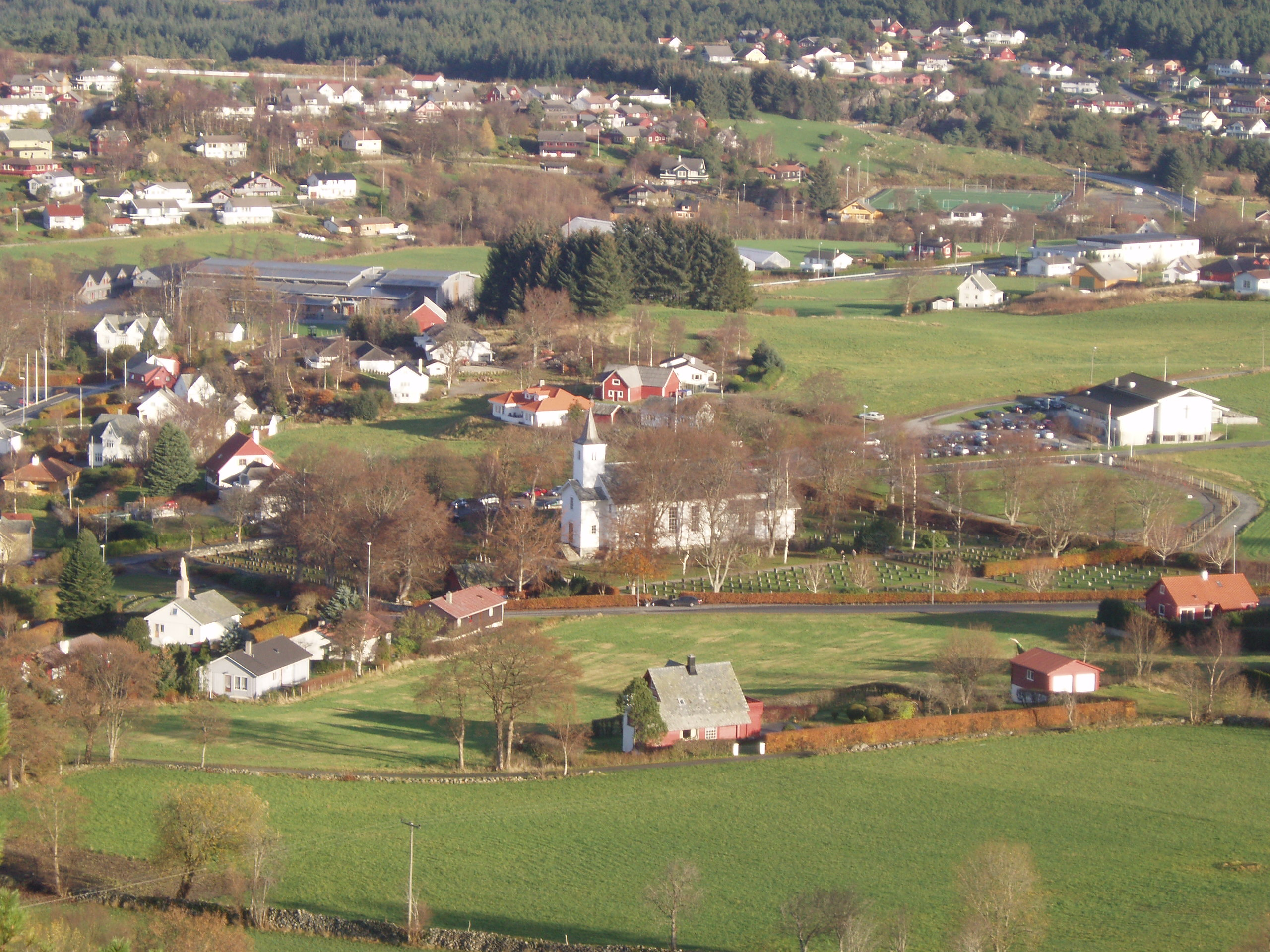 Fitjar kyrkje (i midten). Nedanfor kyrkja (til venstre) ligg Håkonarparken og Håkonstatuen. Bak kyrkja til høgre ligg Fitjar Bedehus. Lenger bak til venstre ligg kultur- og idrettsbygget, medan Fitjar Idrettspark ligg oppafor der igjen (i høgre øvre hjørne)